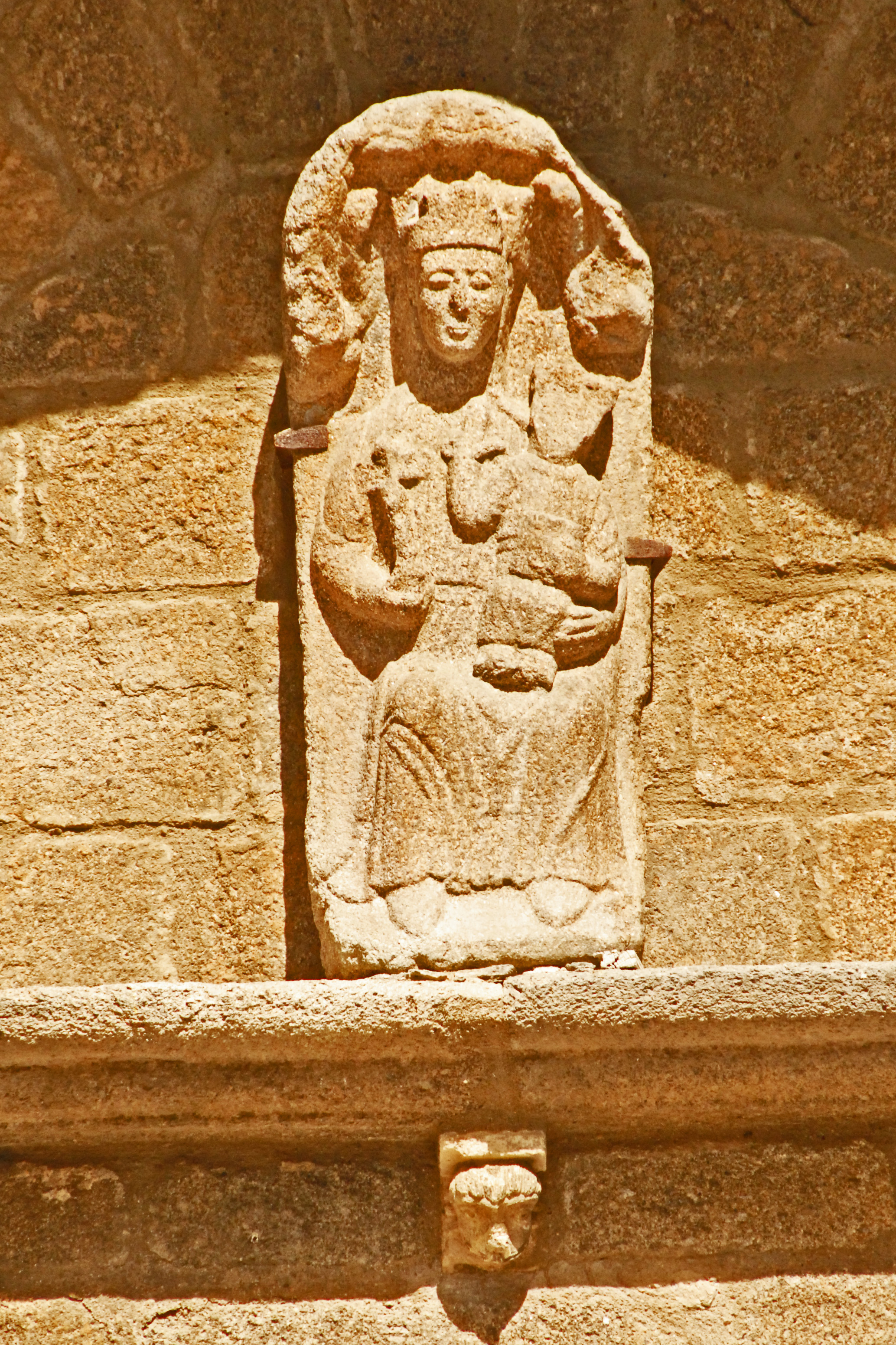 N.-D._de_La_Souterraine.Skulptur